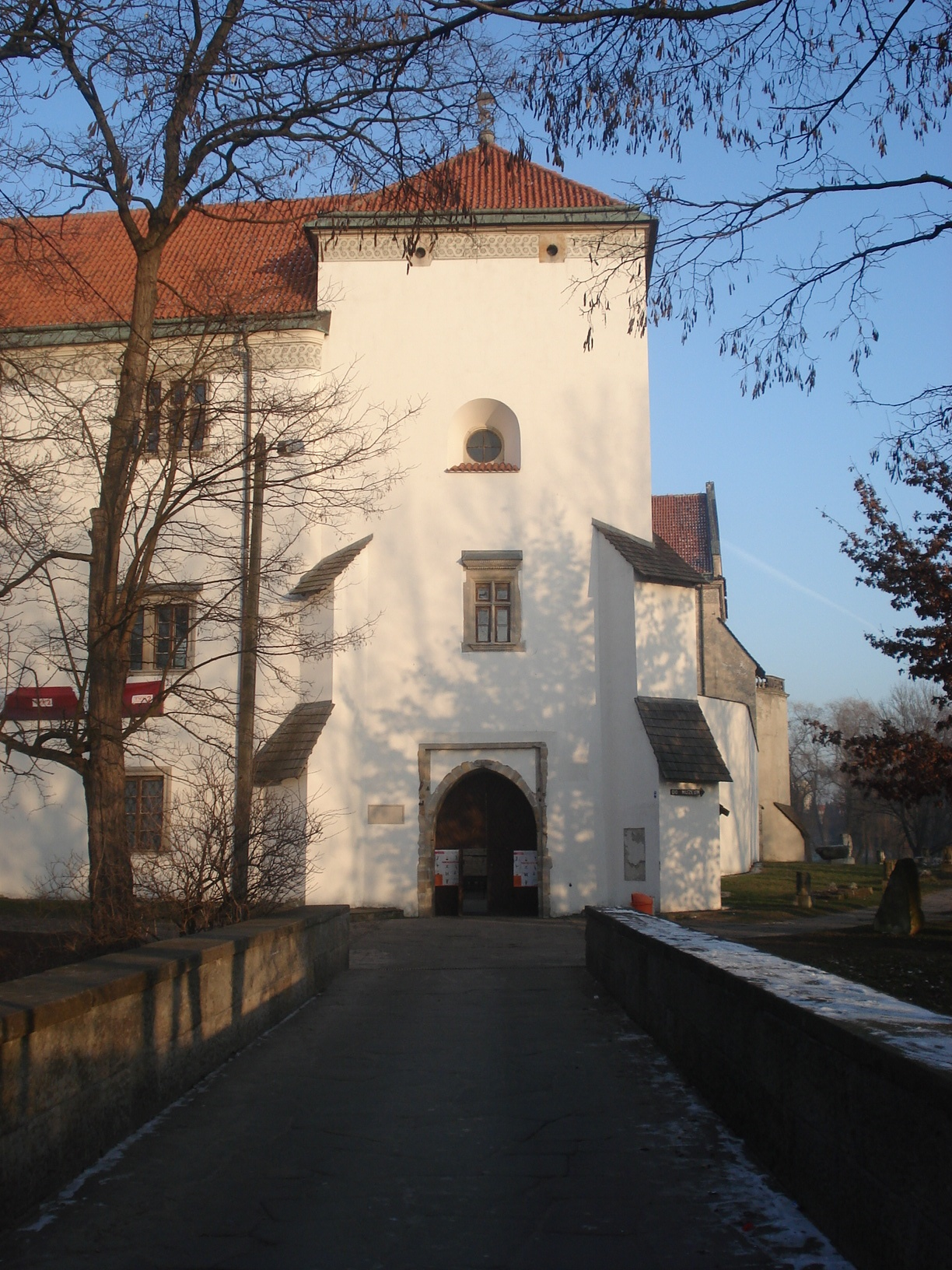 Wieża bramna na zamku w Szydłowcu